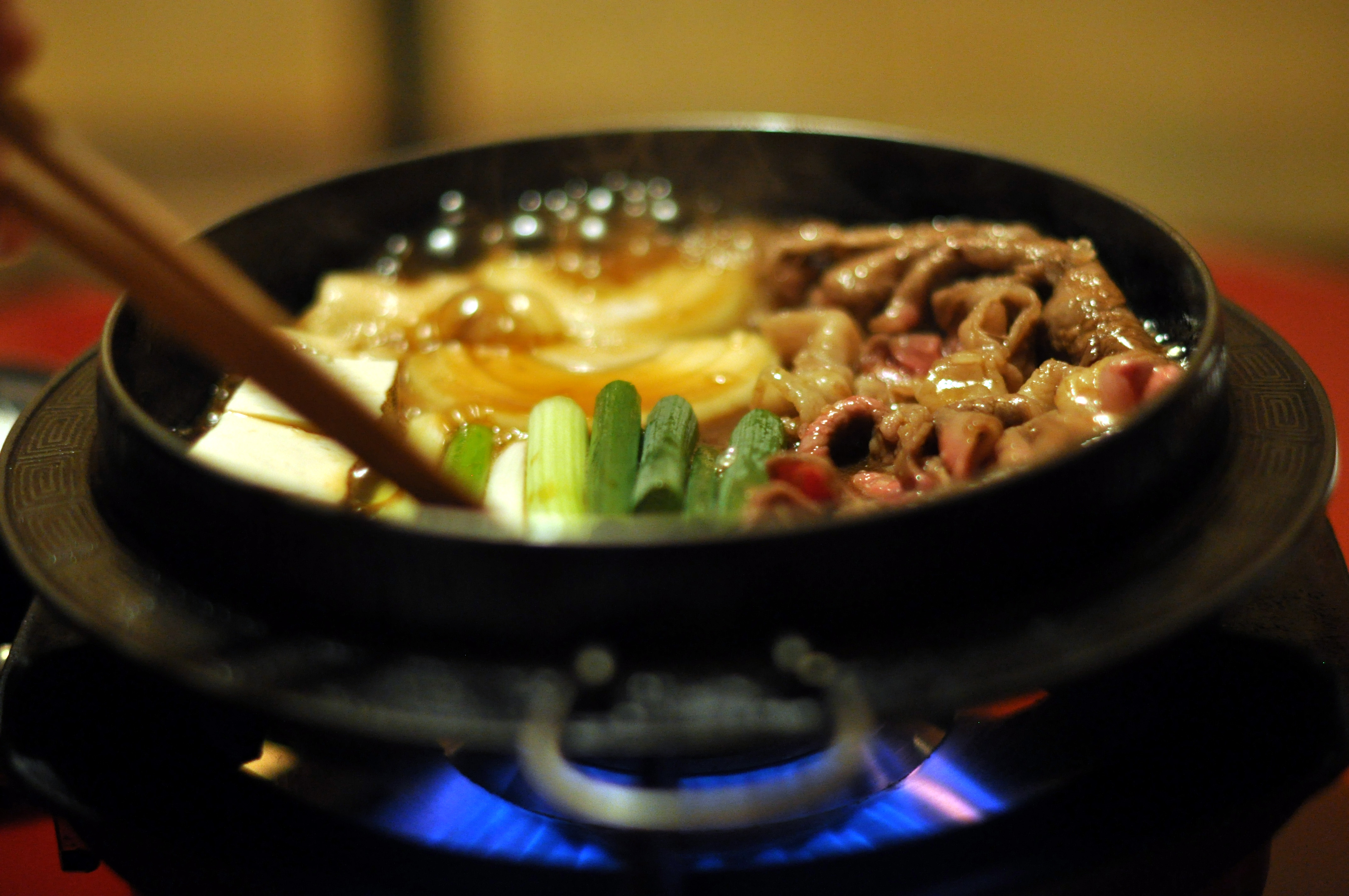 Sukiyaki